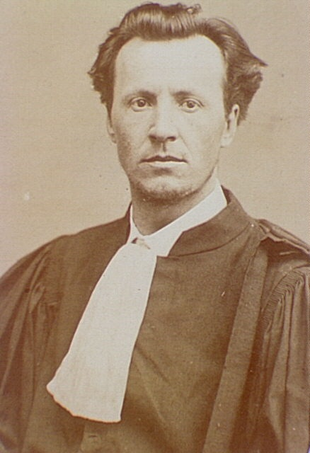 photo d'Eugène Protot